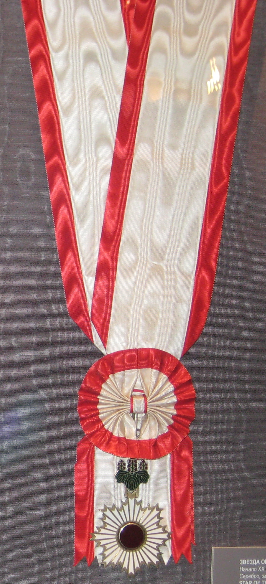 Знак ордена восходящего солнца на большой ленте. Начало 20 века